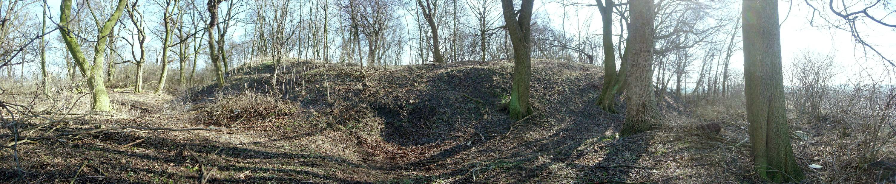 Grodzisko w Ociążu. Panorama od strony północno-zachodniej.